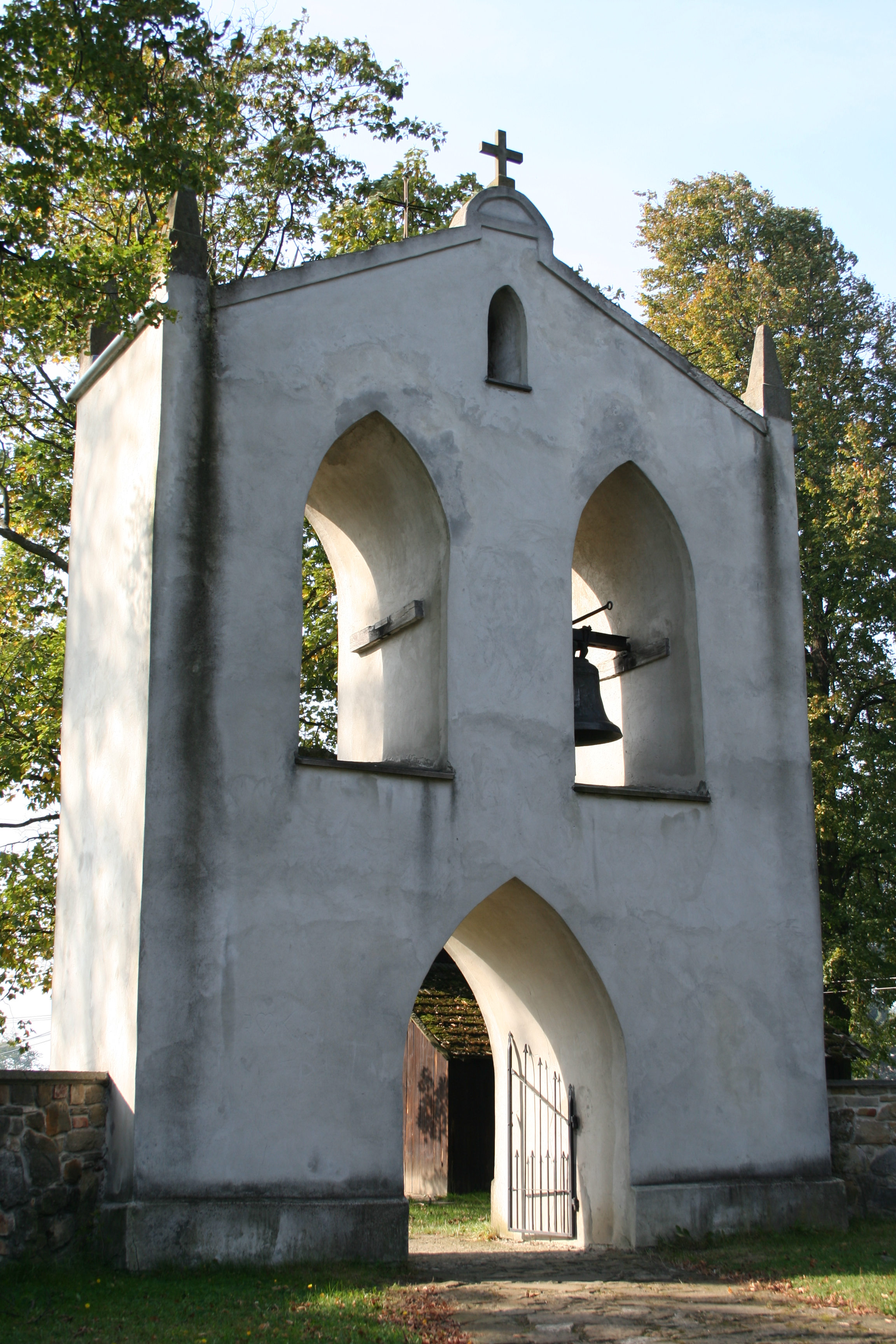 Gogołów, dzwonnica bramkowa, 1874-1881